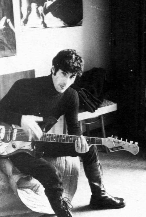 Umberto Bossi nel 1961, quando si dedicava all'attività di cantante con il nome d'arte "Donato".